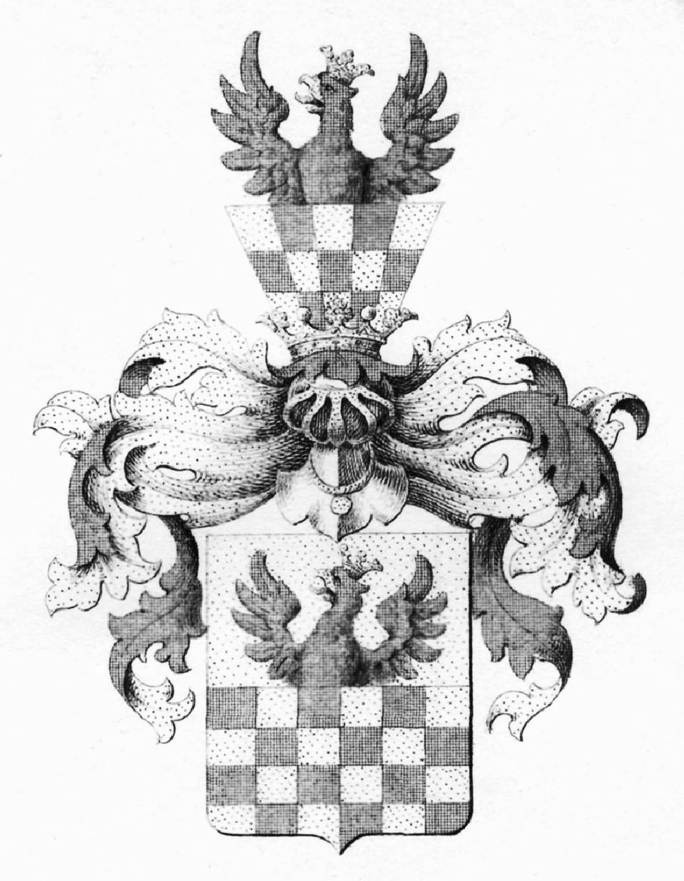 Wappen der Familie von Putbus.